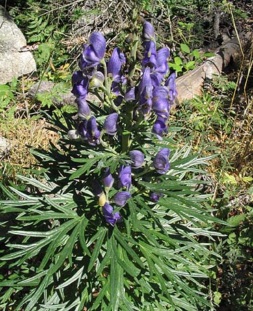 Aconitum napellus (aconit napel). Photo prise à Mosset (col de Jau) en août 2004